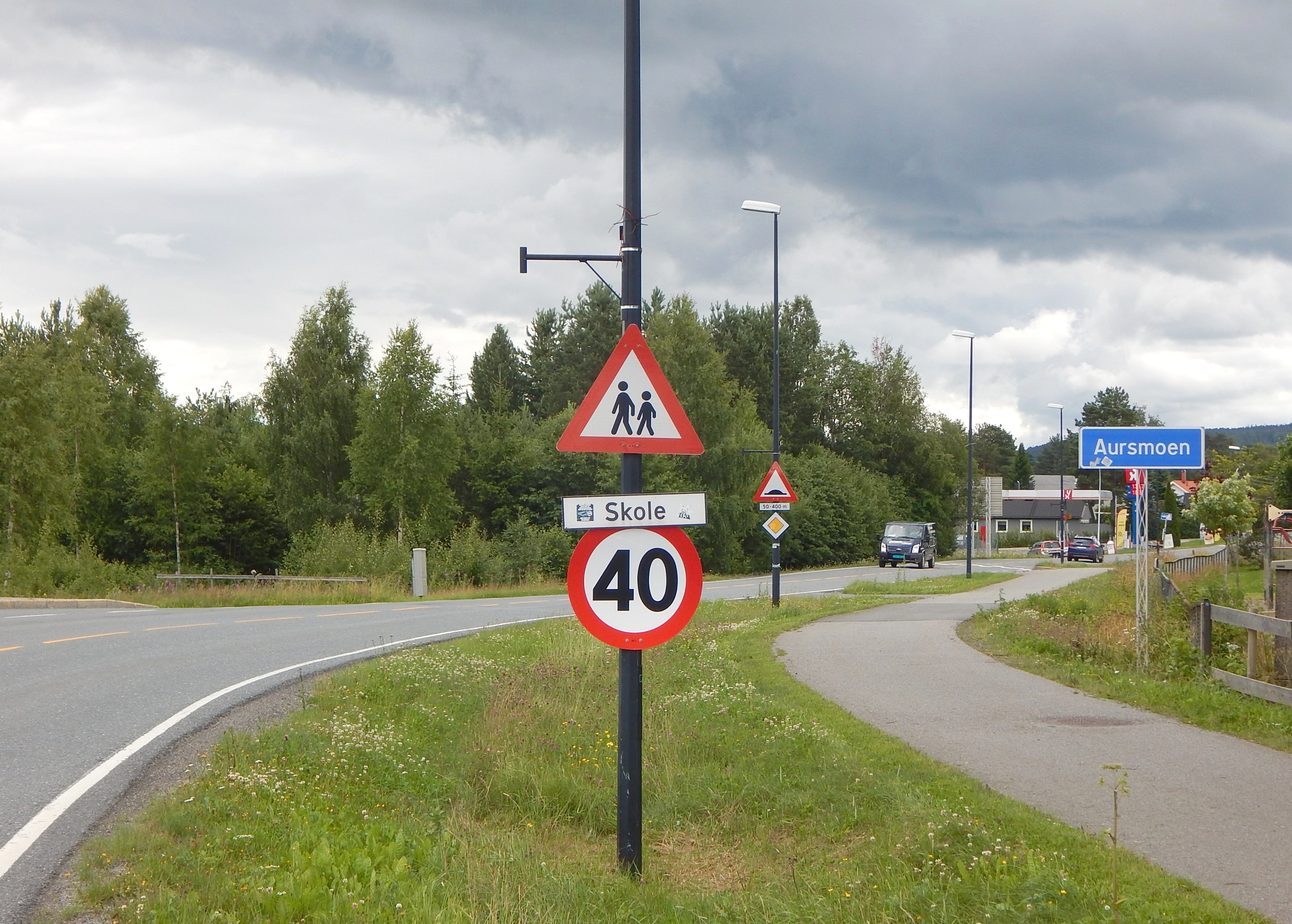 Aurveien (fylkesvei 239) mot Aursmoen